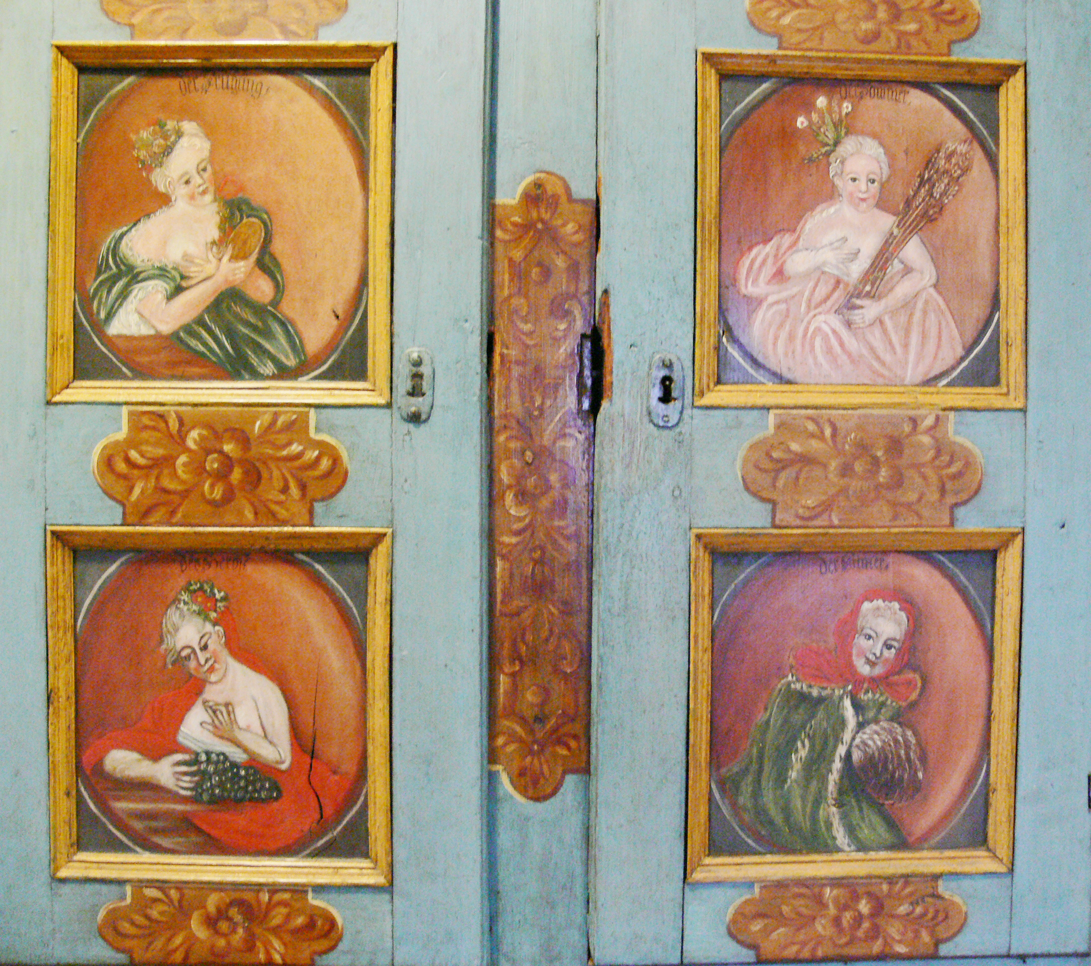 Museum für Thüringer Volkskunde, Erfurt